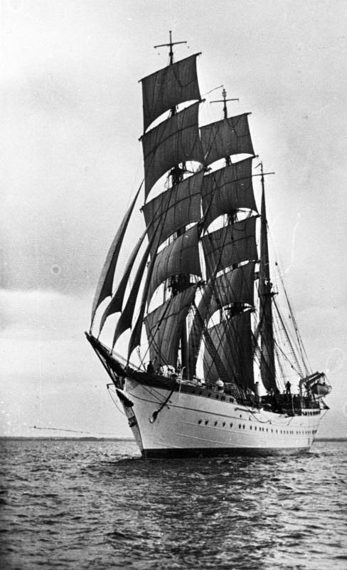 Segelschulschiff "Horst Wessel" Segelschulschiff "Horst Wessel" auf See unter Segeln